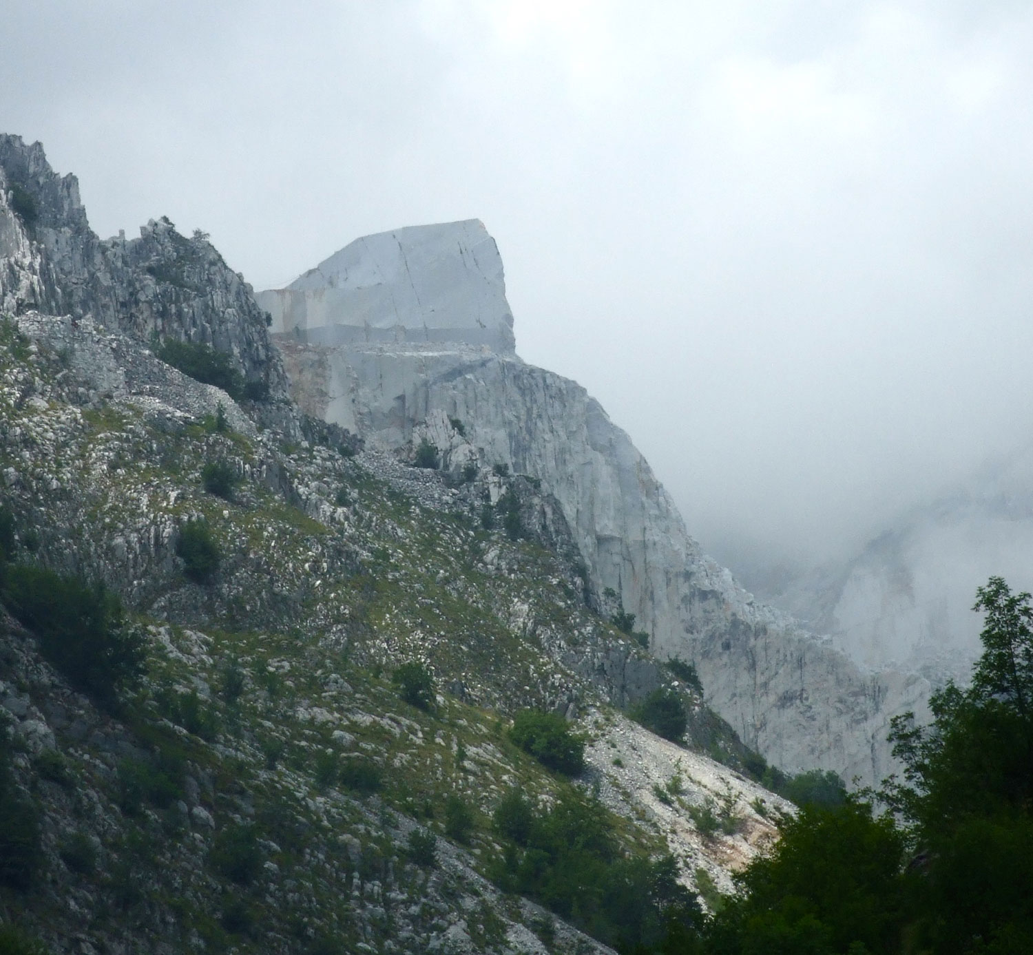 Sommet découpé et transformé en carrière de marbre à Carrare